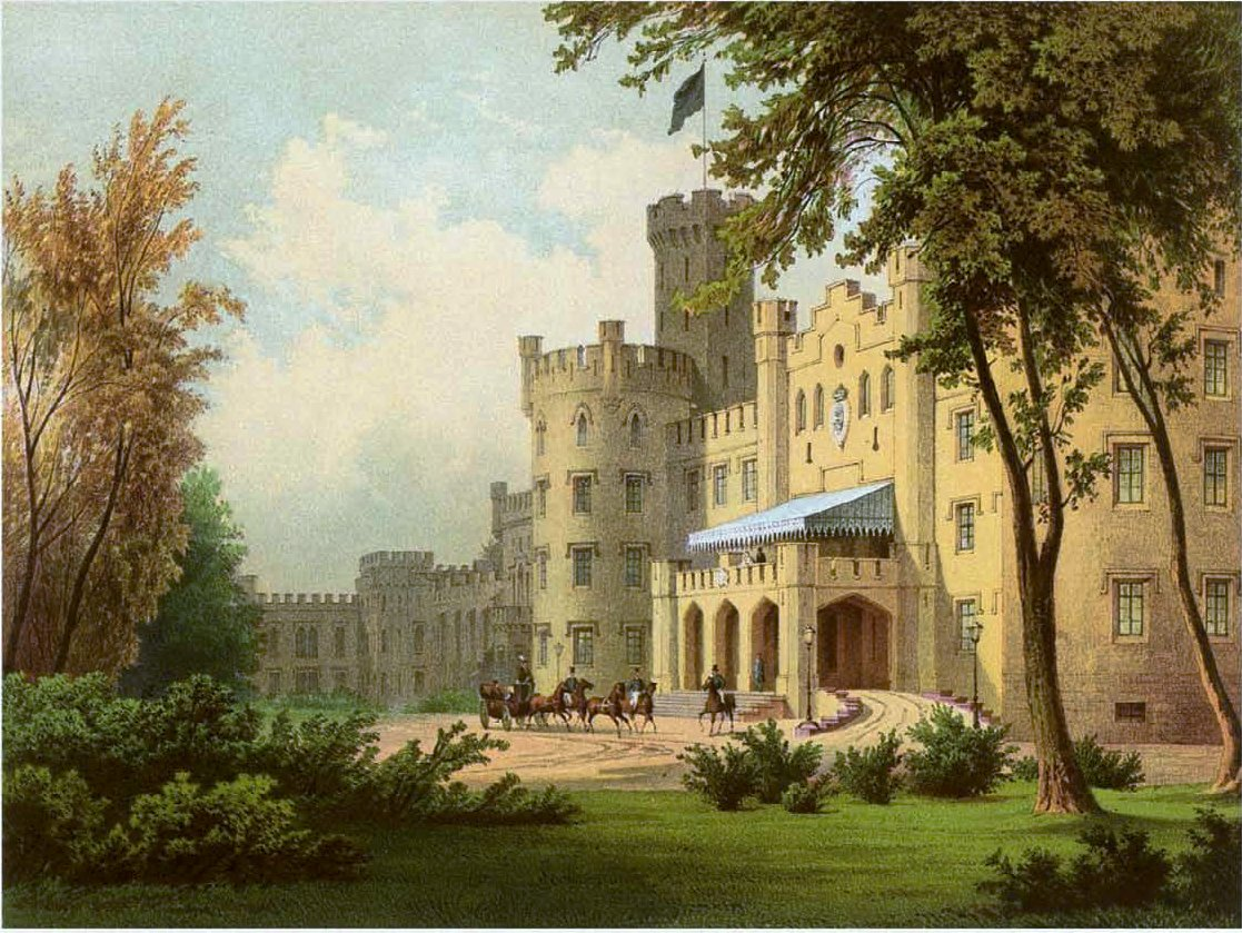 Schloss Sibyllenort, Kreis Oels